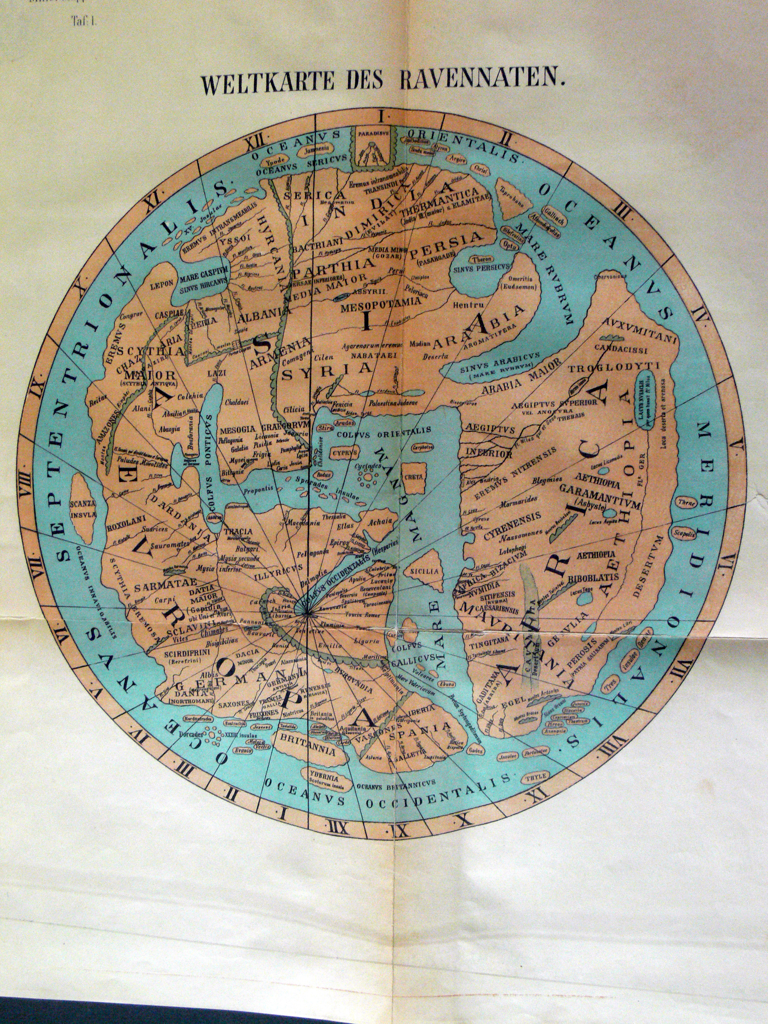 Weltkarte des anonymen Ravennaten